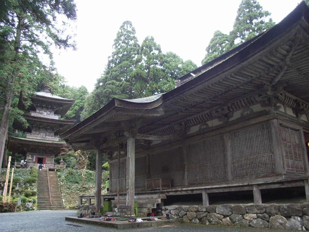 明通寺本堂と三重塔。国宝。明通寺にて。200611に投稿者が撮影。